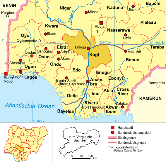 Politische Karte Nigerias (Bundesstaat Kogi hervorgehoben)